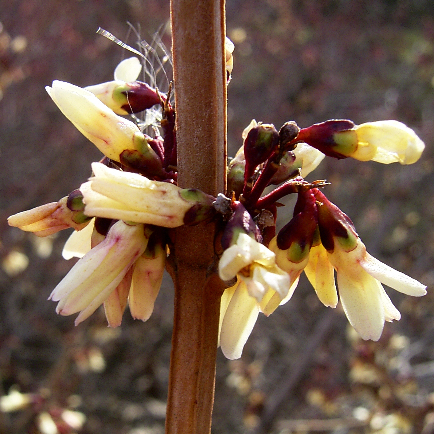 Eine weiße Blüte des Zweizeiligen Abeliophyllums - Abeliophyllum distichum